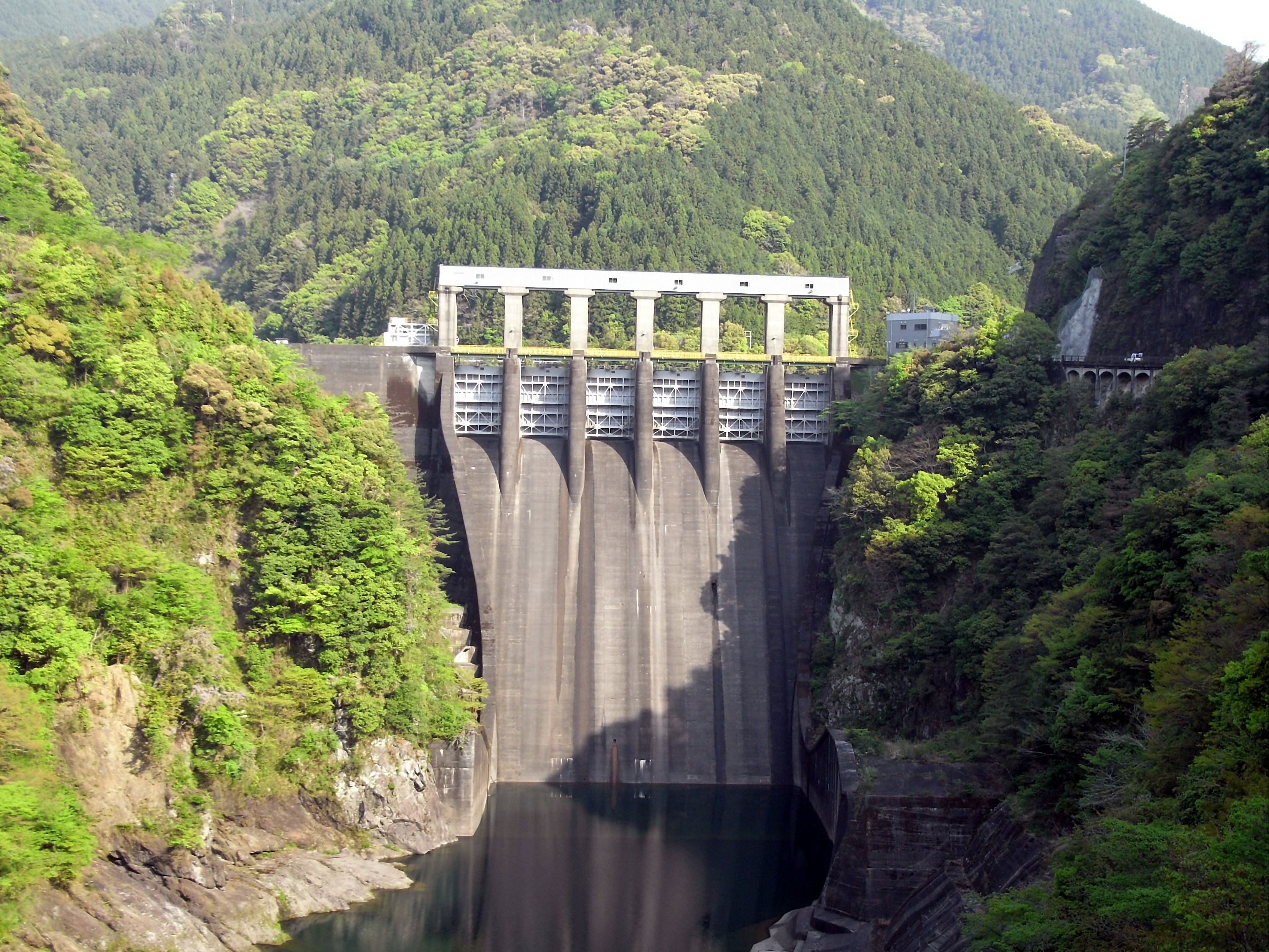 Dam